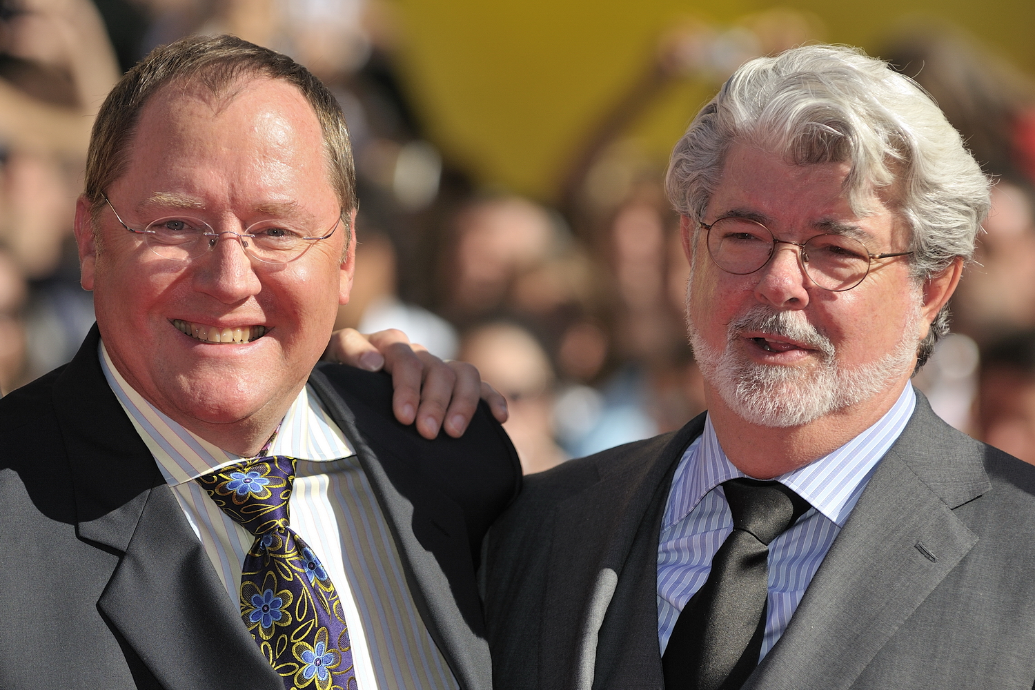 66ème Festival du Cinéma de Venise (Mostra), 5ème jour (06/09/2009) Geaorges Lucas et les réalisateurs de Pixar receoivent un Lion d'Or pour l'ensemble de leur carrière : John Lasseter (Toy Story, 1001 Pattes, Cars...), Brad Bird (Les Indestructibles, Ratatouille), Pete Docter (Monstres et Cie, Là-haut), Andrew Stanton (Le Monde de Nemo, WALL•E) et Lee Unkrich (Toy Story 2, Monstres et Cie, Le Monde de Nemo)